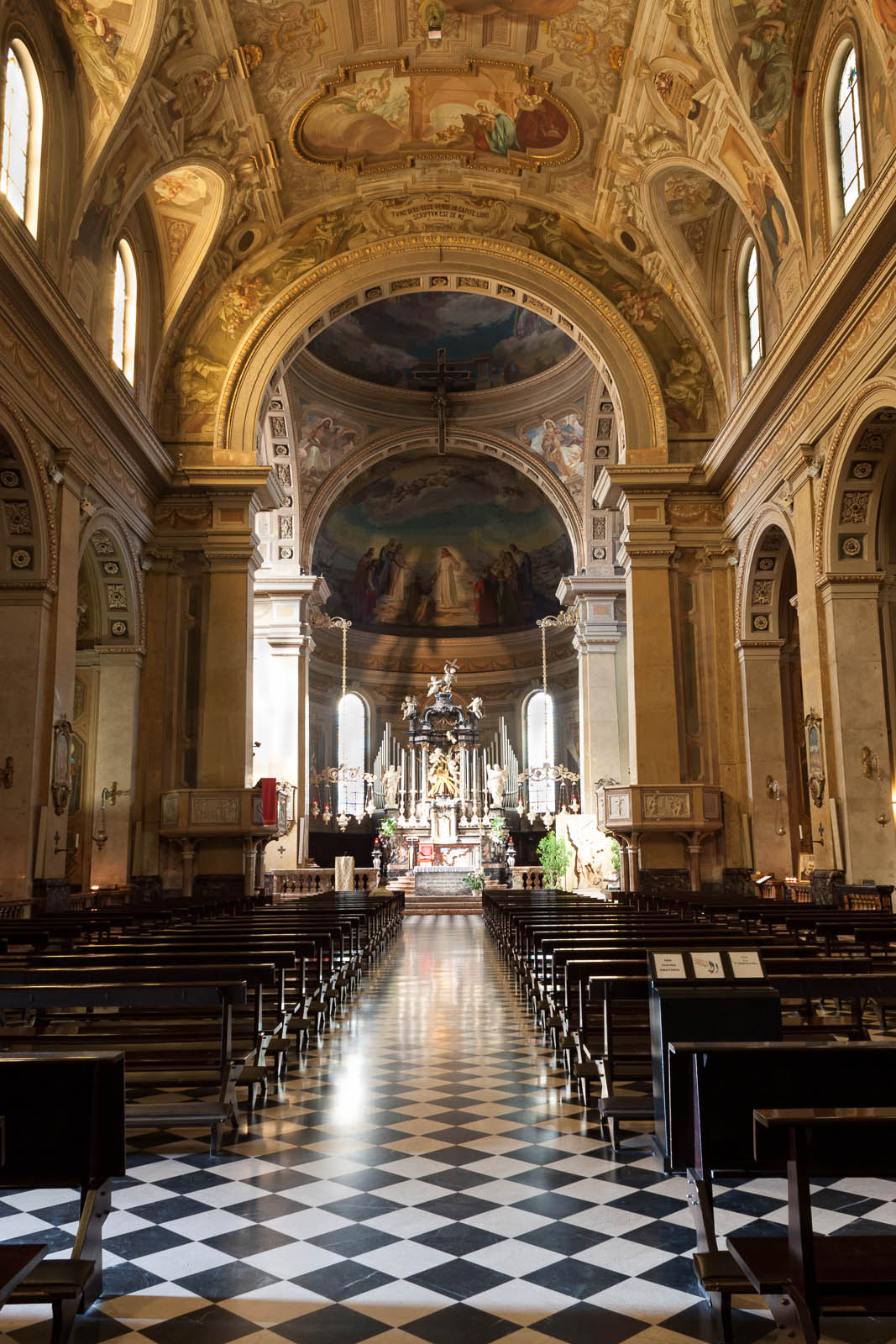 San Michele Arcangelo This is a photo of a monument which is part of cultural heritage of Italy.